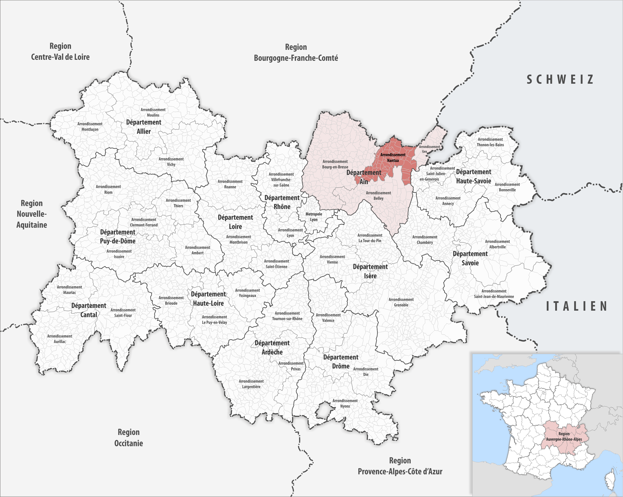 Lage des Arrondissements Nantua